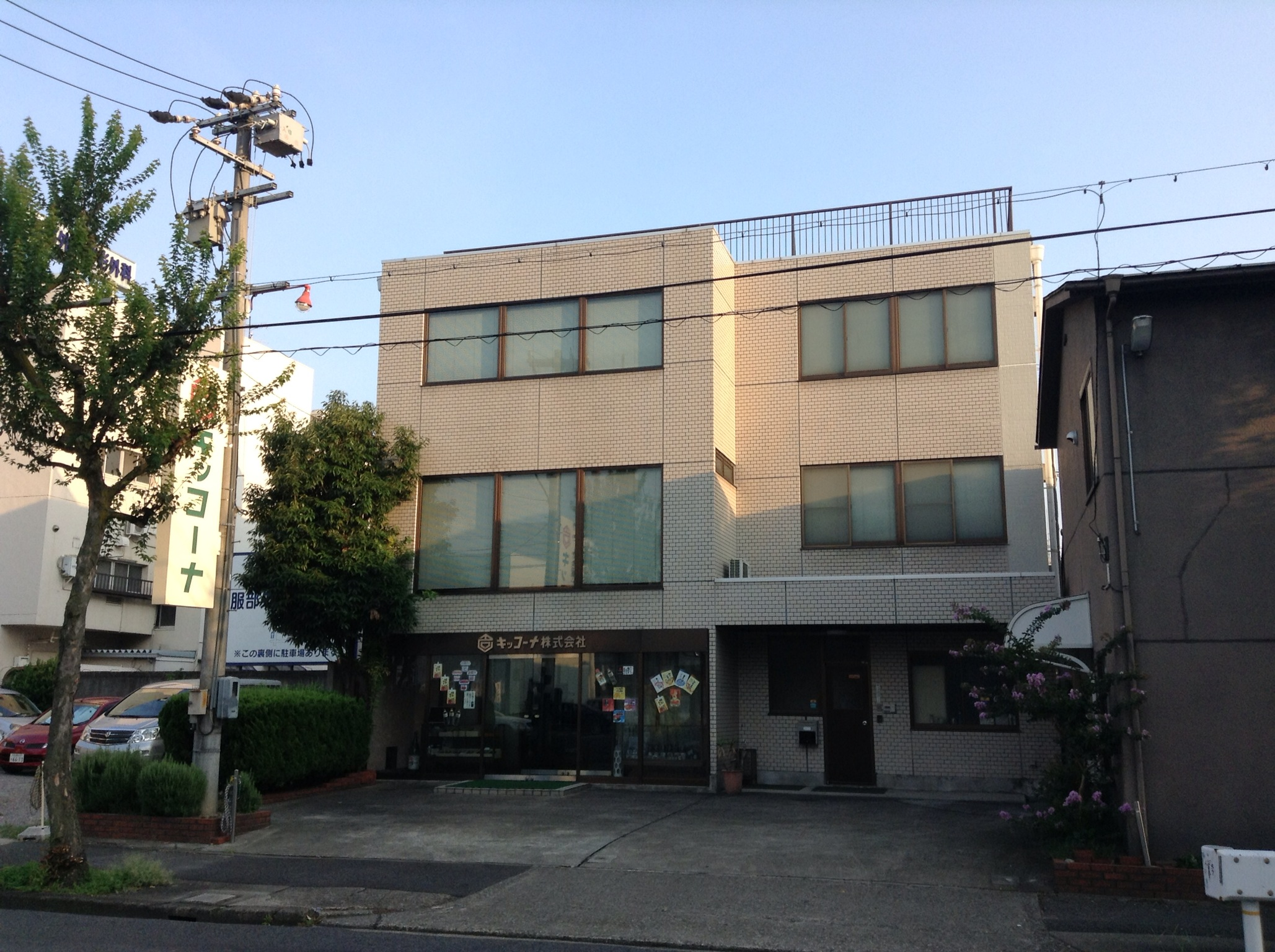 名古屋市北区長喜町にあるキッコーナ本社正面(北側)より写す